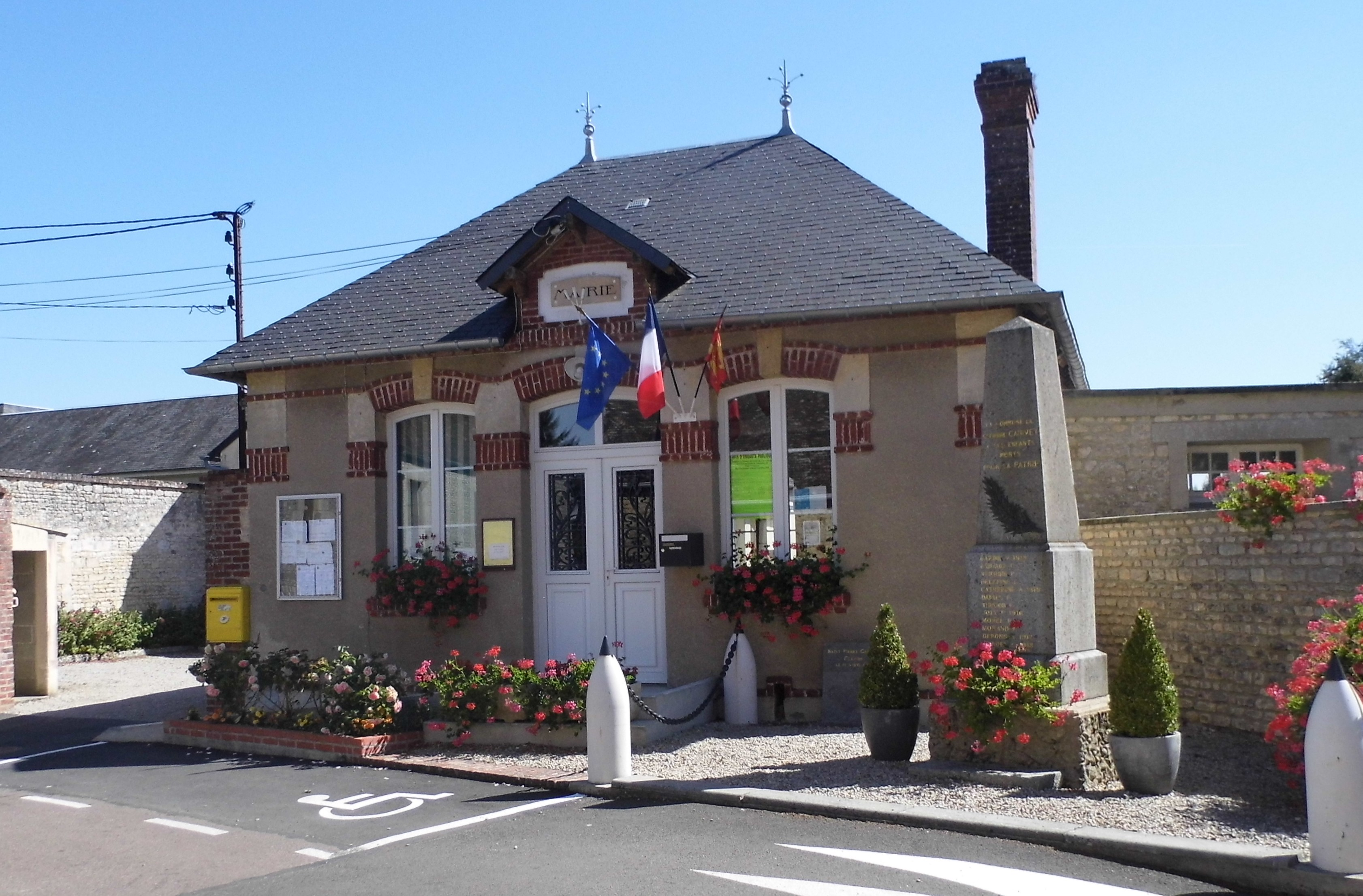 Mairie de Saint Pierre Canivet